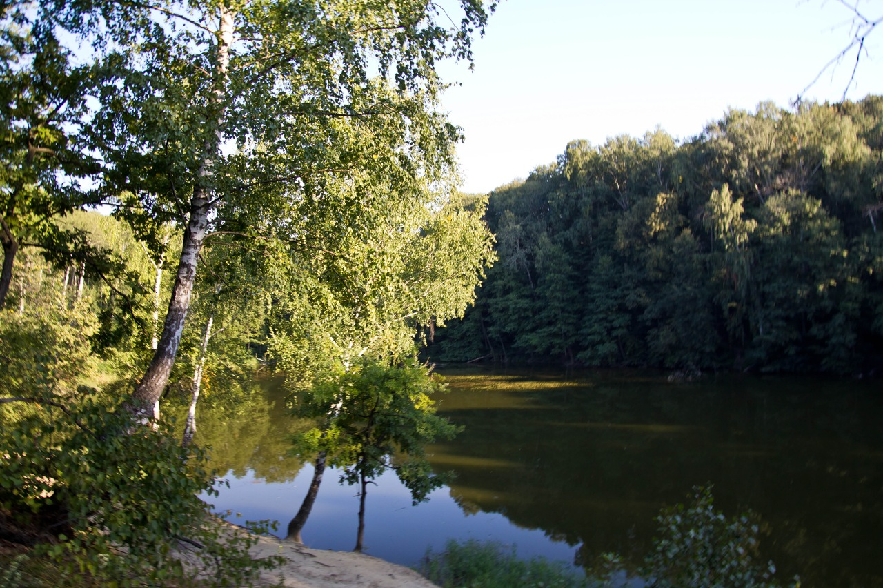 озеро гладкое вблизи хутора угрим белгородского района белгородской области.